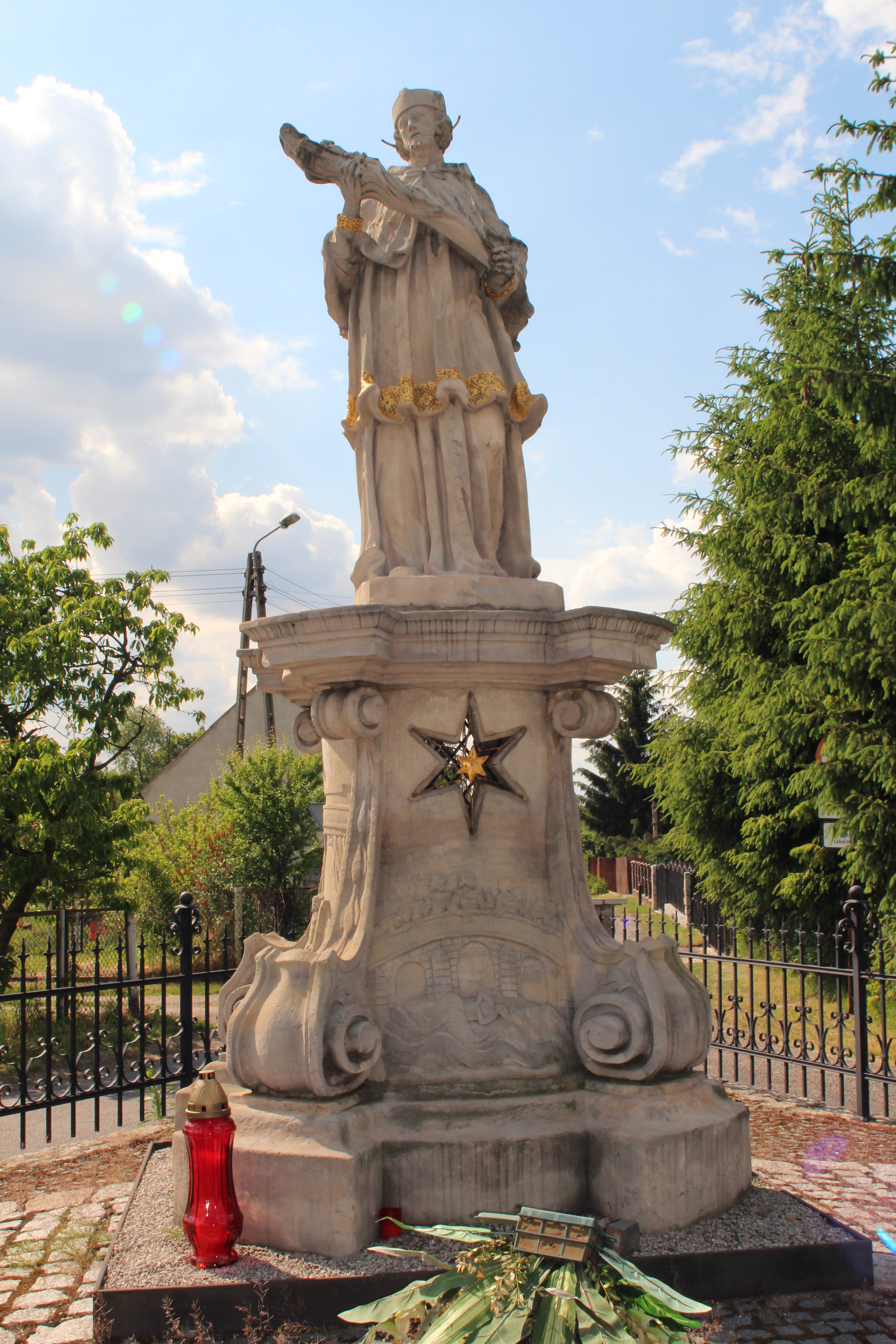 Święty Jan Nepoucen (ok. 1740). Mrozów.